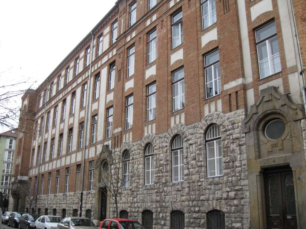 Csata utcai általános iskola Gömb utca felé eső frontja (tervező: Rerrich Béla, 1909-1911) (Budapest, XIII. ker., Gömb u. 25., az iskola bejárata a Csata u. 20. alatt van)